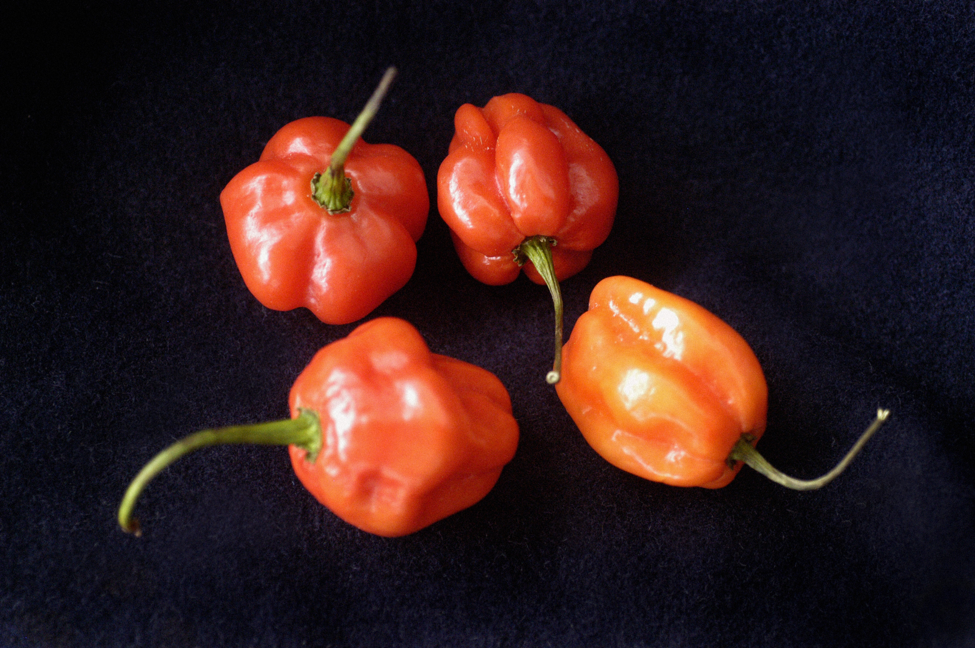 Pimenta de cheiro (Capsicum chinense) fruto